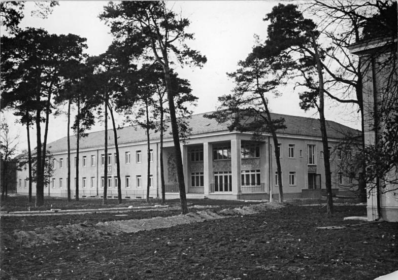 Berlin, Königsheide, Kinderheim, Haus 1 Zentralbild Quaschinsky 8.12.1953 Im Hauptkinderheim des Magistrats in der Königsheide. Mitten in den herrlichen Kiefernwäldern am Rande Berlins schuf der Magistrat mit einem Kostenaufwand von 7,5 Millionen DM eine neue Heimstätte für 500 elternlose Kinder. Zu dieser grossen Kinderstadt gehören vier Kinderhäuser mit hellen, gemütlich eingerichteten Räumen, ein Ambulatorium mit einem Säuglingsheim, eine Schule mit zehn Klassenräumen, Physik- und Musikzimmer. Auf dem weiten bewaldeten Gelände haben die jungen Bewohner des Heims die Möglichkeit, sich viel in der frischen Luft zu bewegen und zu gesunden und frohen Menschen heranzuwachsen. In dieses Kinderheim werden auch Kinder aufgenommen, deren Eltern für einige Zeit aus persönlichen Gründen nicht imstande sind, ihrer Erzieherpflicht nachzukommen. UBz: Im Haus 1 sind die Drei- bis Sechsjährigen untergebracht.